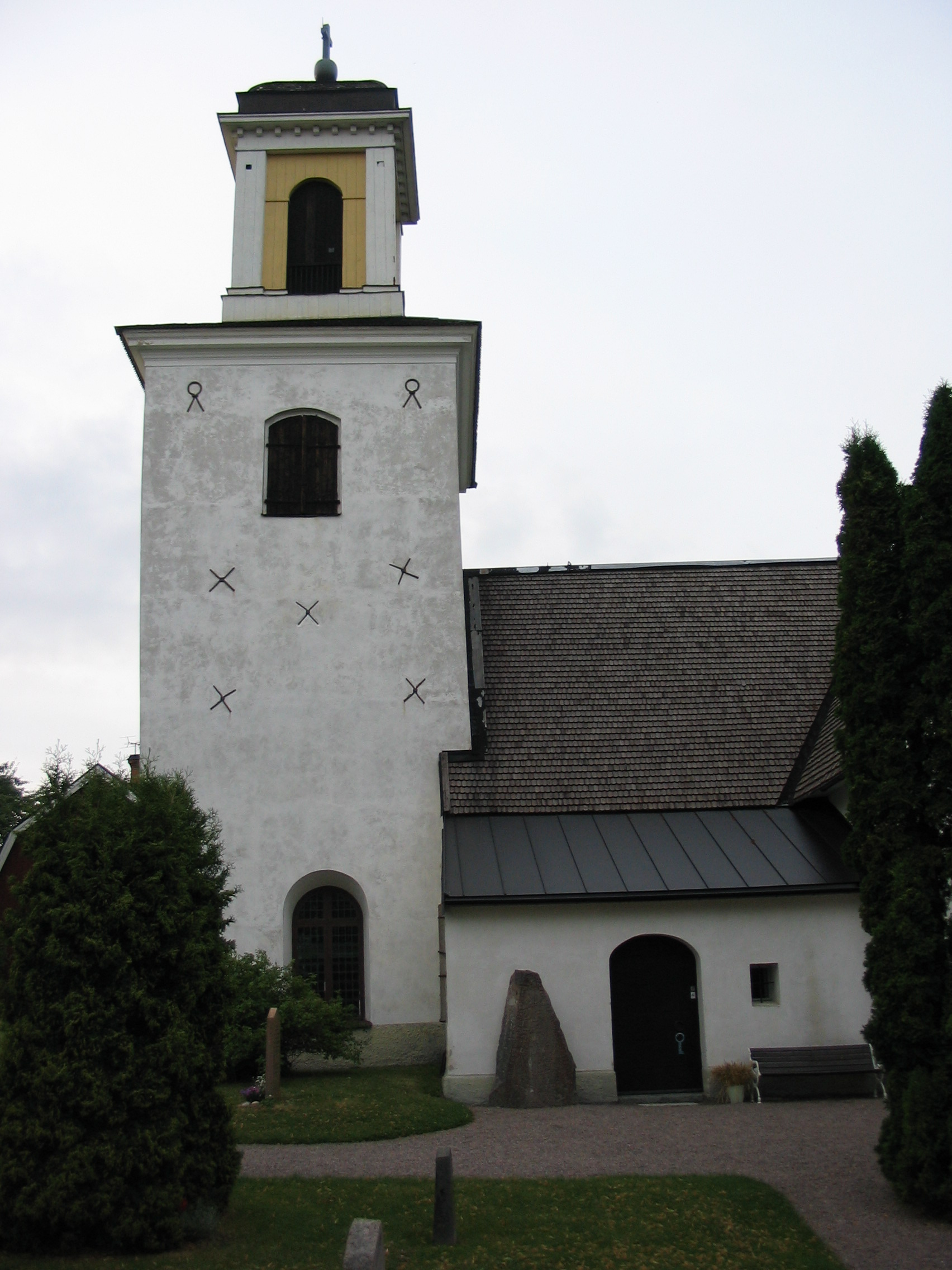 Alsike kyrka